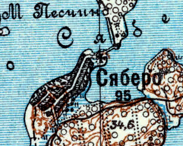 Топографическая карта Ленинградской области, квадрат VIc-27 (Залустижье), деревня Сяберо